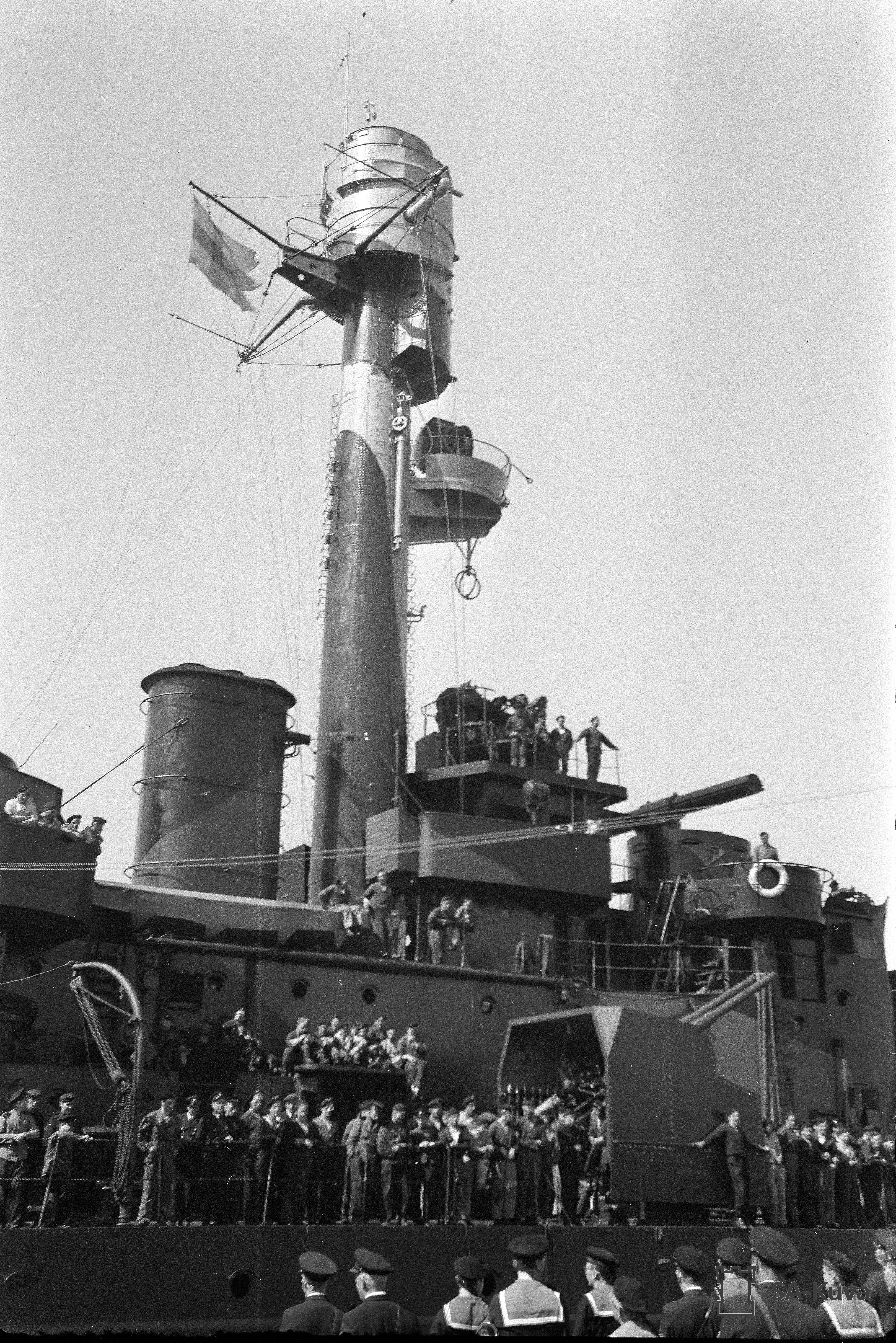 Panssarilaivan miehistö kerääntynyt kuuntelemaan soittokunnan jäähyväiskonsertin. (Kuvauspaikka: Turun Satama)